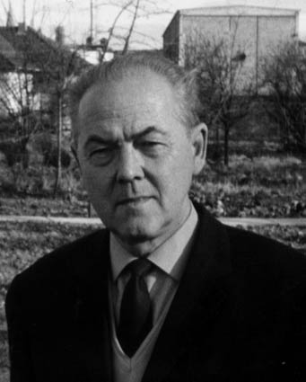 Porträtaufnahme von Walter Wenger, Grafiker, Illustrator und Amateur-Zauberkünstler